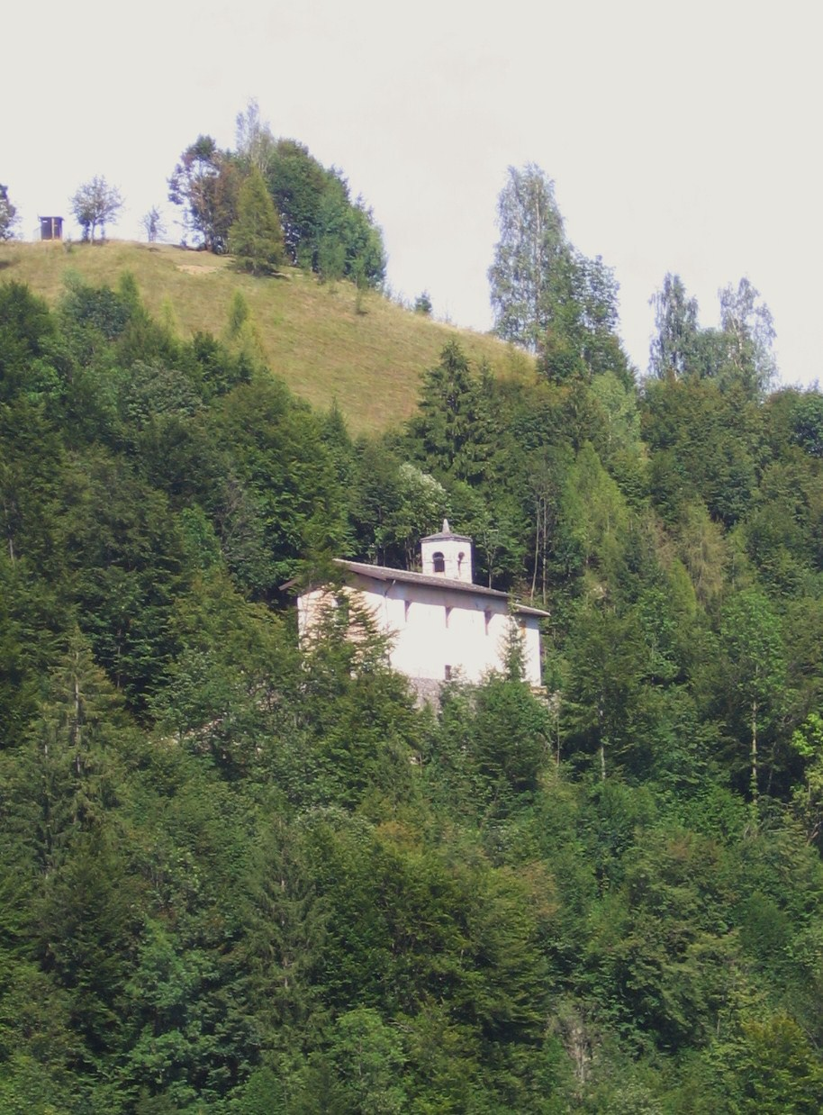 Cusio, Bergamo, Italy